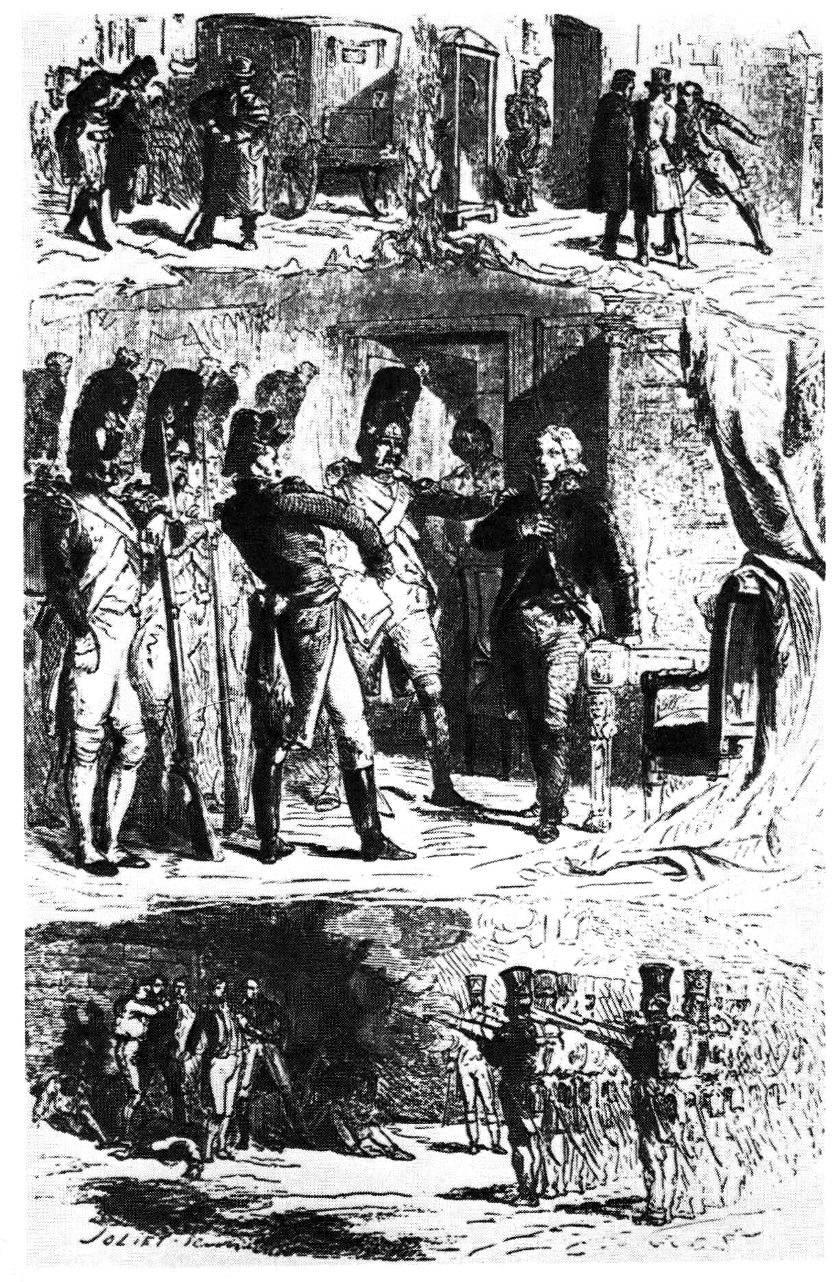 Гравюры, иллюстрирующие сцены заговора генерала К.-Ф.Мале в 1812 году.